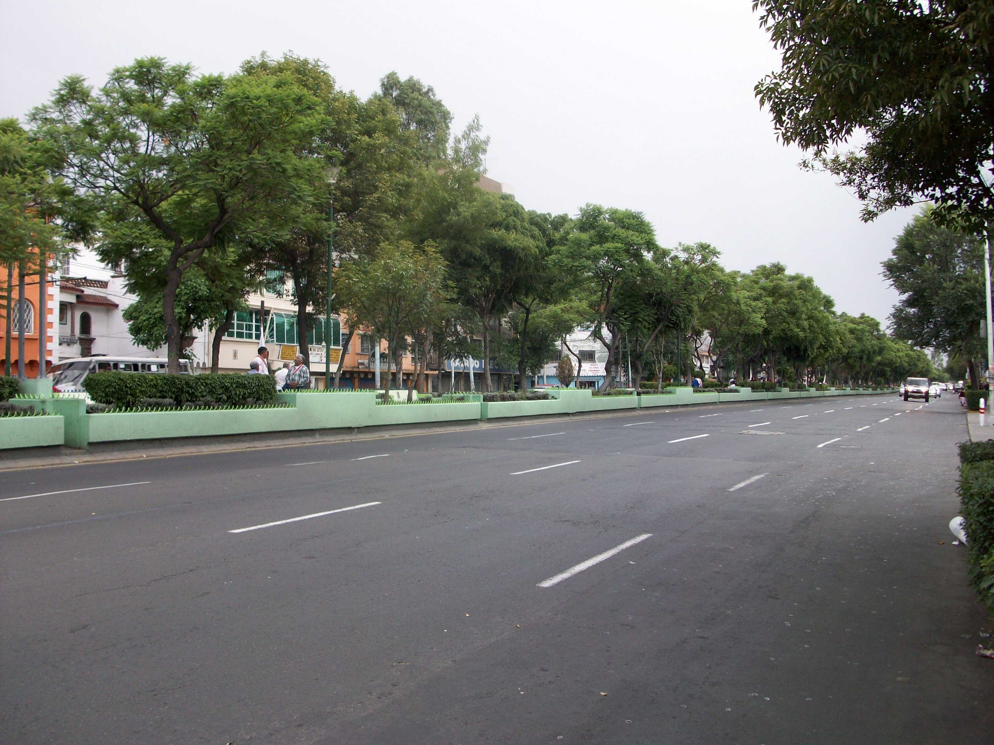 Fotografia de la calzada de Guadalupe